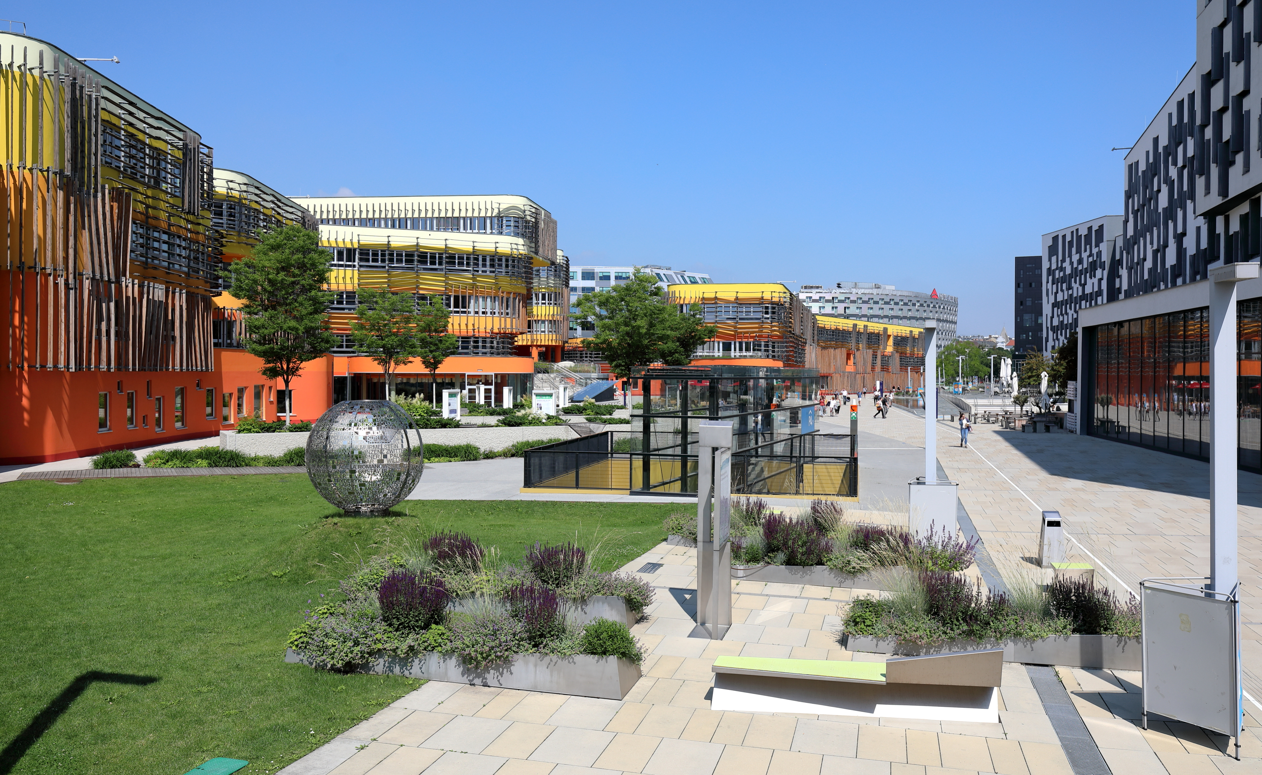 Der Nordwestbereich des WU Campus der Wirtschaftsuniversität im 2. Wiener Gemeindebezirk Leopoldstadt. Links das Department 3 (D3), Bildmitte das Administration Department (AD), rechts das Department 4 (D4) und im Vordergrund das NS-Denkmal. Der Campus mit rund 35.000 m² verbauter Grundfläche und etwa 55.000 m² öffentlich zugänglicher Freifläche wurde von 2009 bis 2013 auf dem südwestlichen Teil des einstigen Weltausstellungs- und späteren Messegeländes am Nordostrand des Wiener Praters um rund eine halbe Milliarde Euro errichtet. D3 & AD plante das Architekturbüro Architekturbüro Crab Studio aus London unter der Leitung von Peter Cook und Gavin Robotham und D4 das spanische Architekturbüro Estudio Carme Pinós.